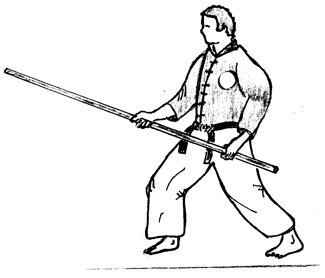 baton_long.jpg